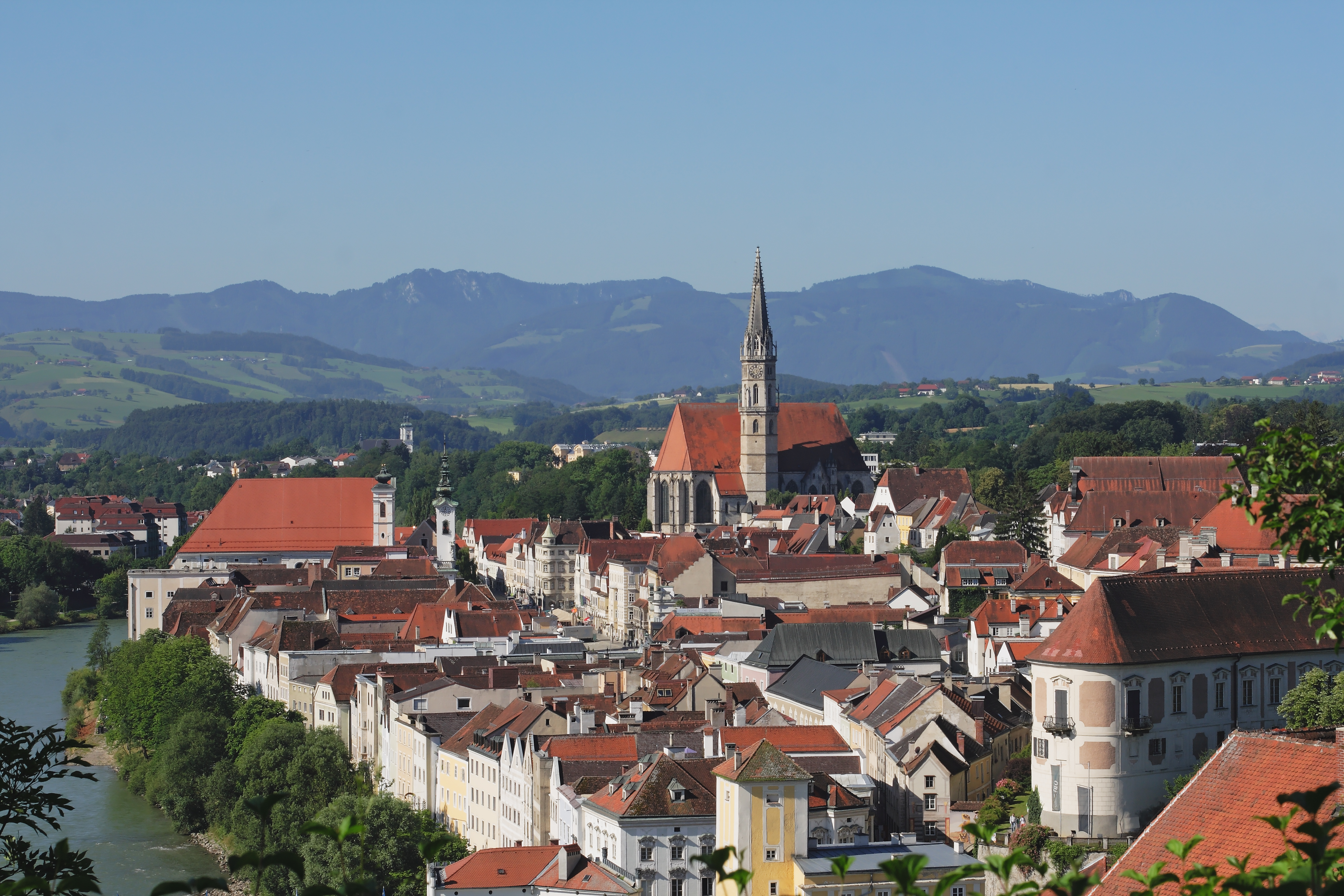 Blick vom Tabor auf die Steyrer Altstadt